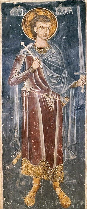 Матэр'ял і тэхніка Фрэска Месцазнаходжанне Музей ікон (Muzeum Ikon), Супрасль